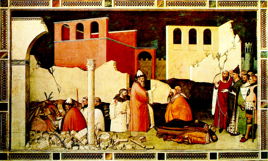 Fresque de la vie de saint Sylvestre de Maso di Banco à Santa-Croce (Florence)